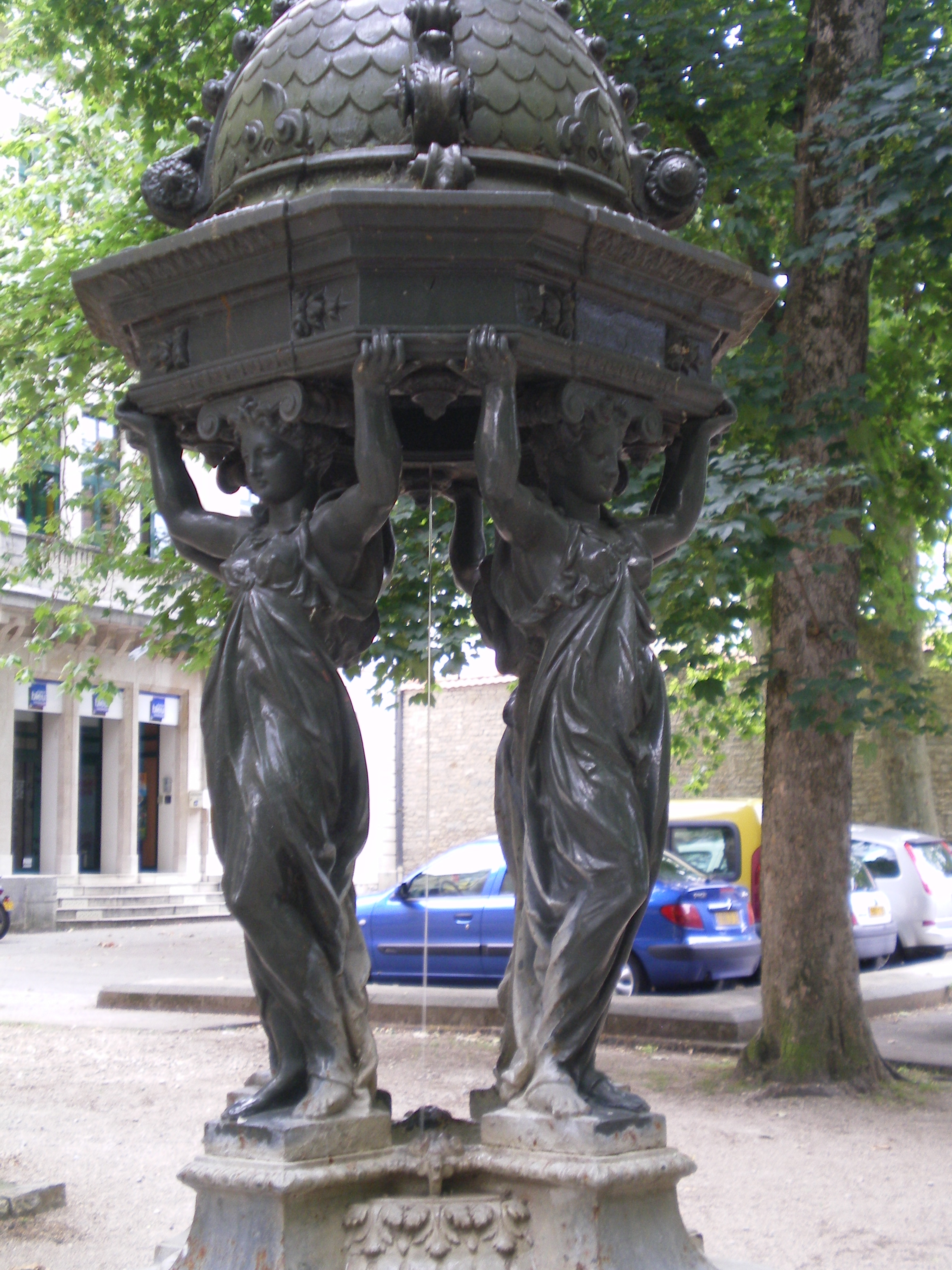 Fontaine